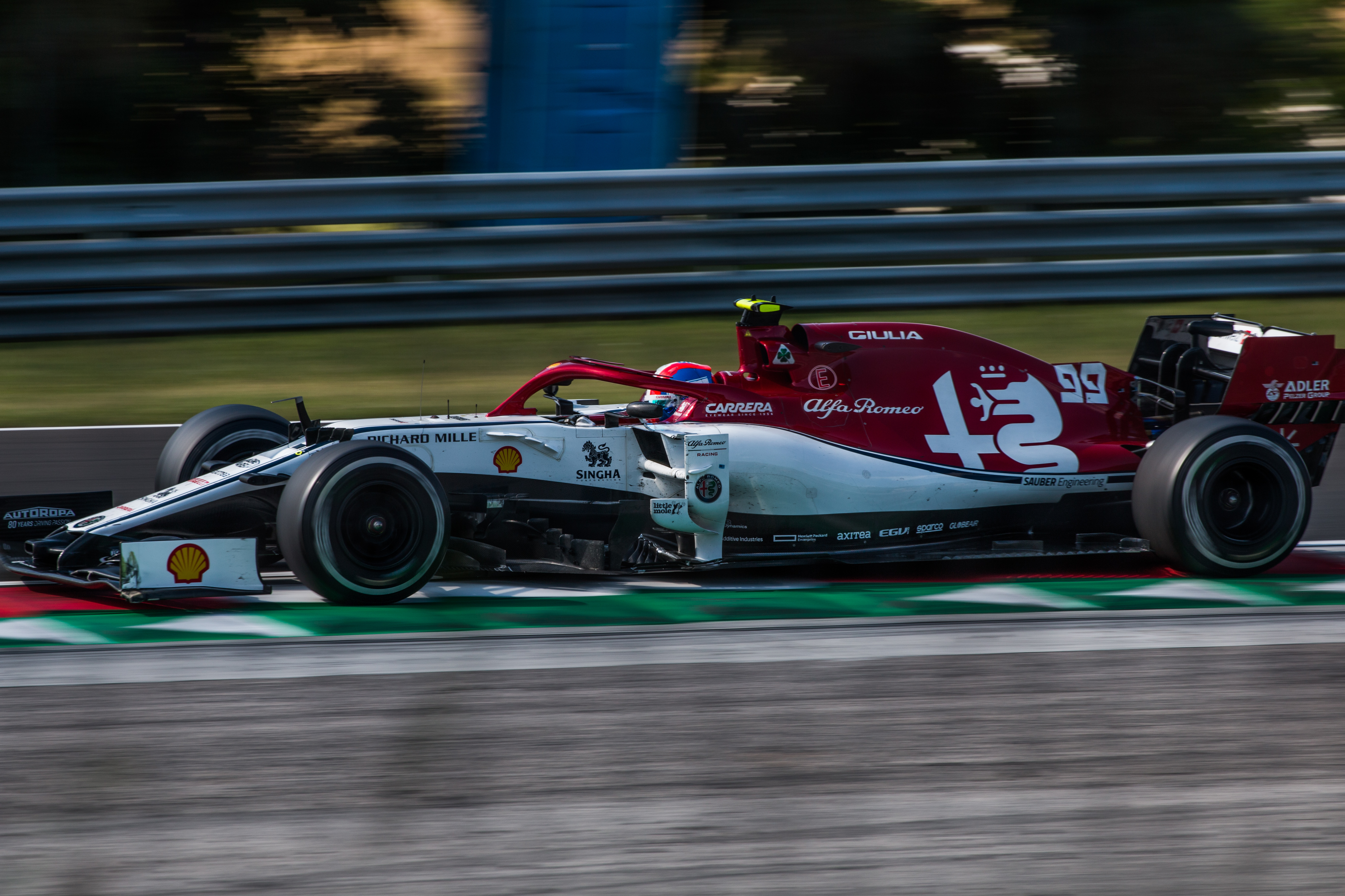 Antonio Giovinazzi in his Alfa Romeo Racing C38 during Formula 1 Hungarian Grand Prix 2019 on the Hungaroring